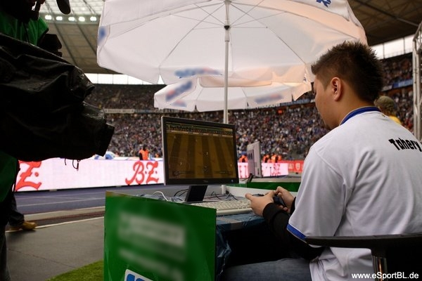 Aufzeichnung der eSport Bundesliga. Bearbeitung: Logos entfernt, Originalbild: Datei:Aufzeichnung.jpg